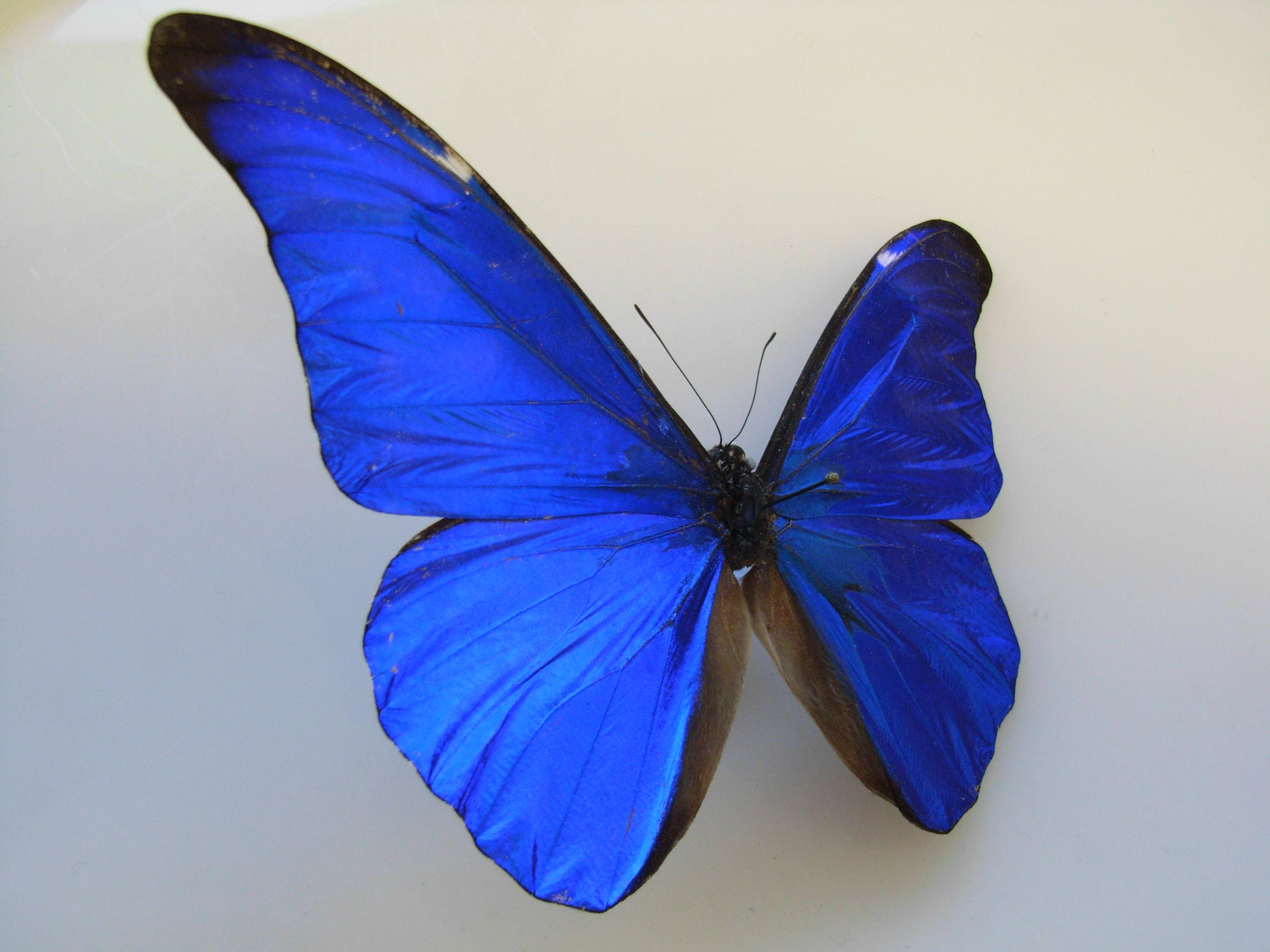 Morpho rhetenor iridescence